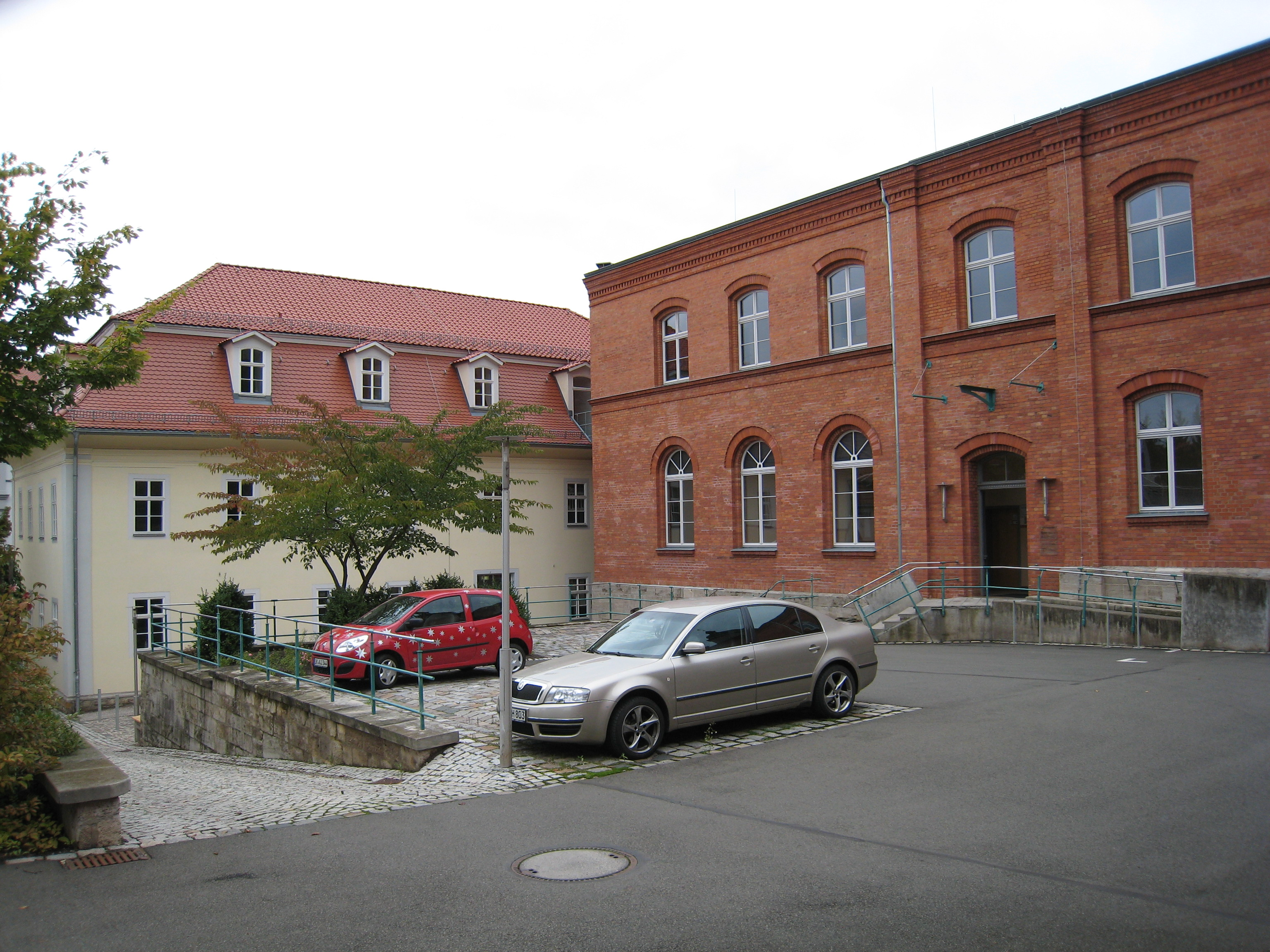 Ehemaliges Waisenhaus am Schulplan in Arnstadt, Innenhof, rechts Berufsschule